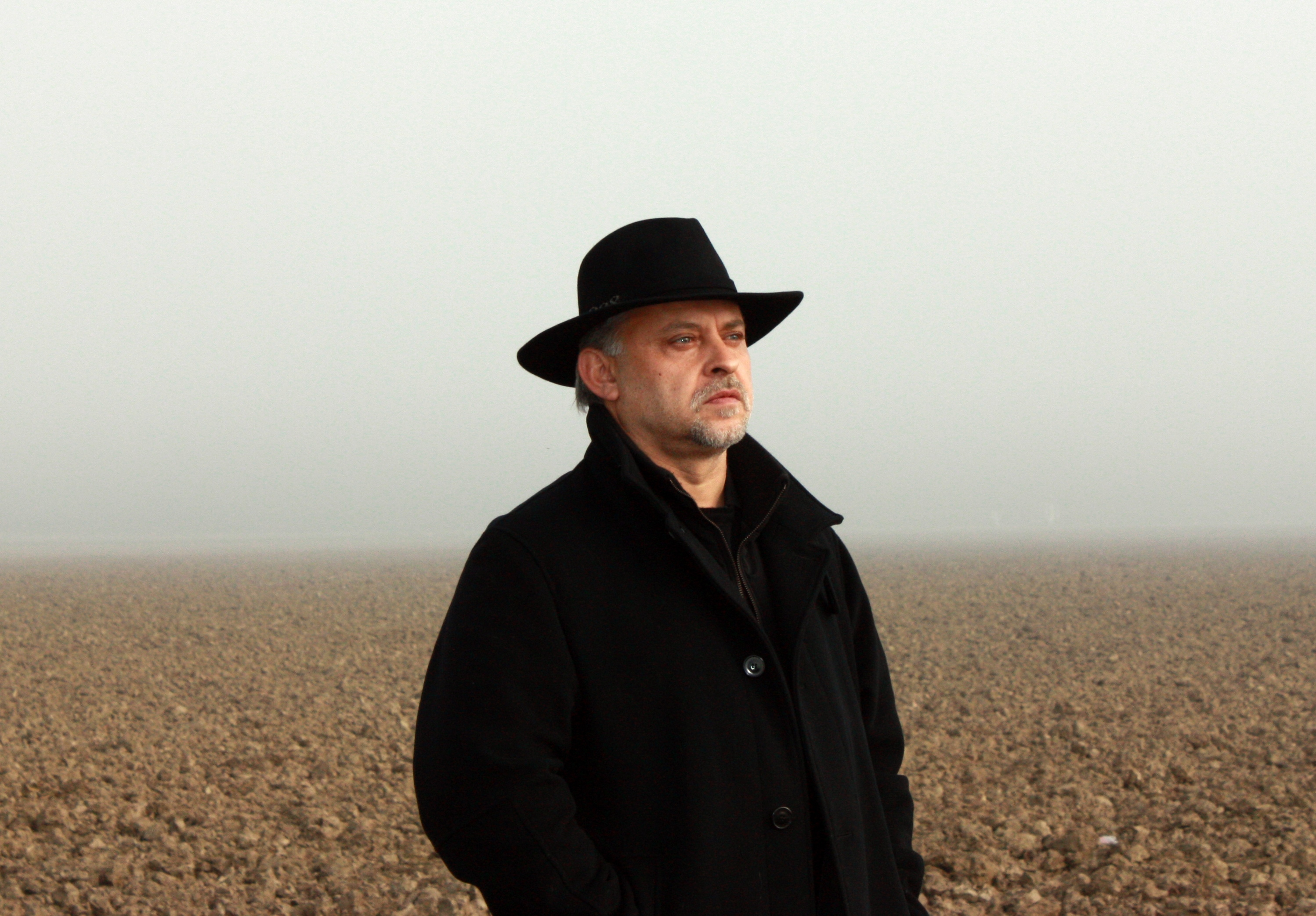 Feri Lainšček